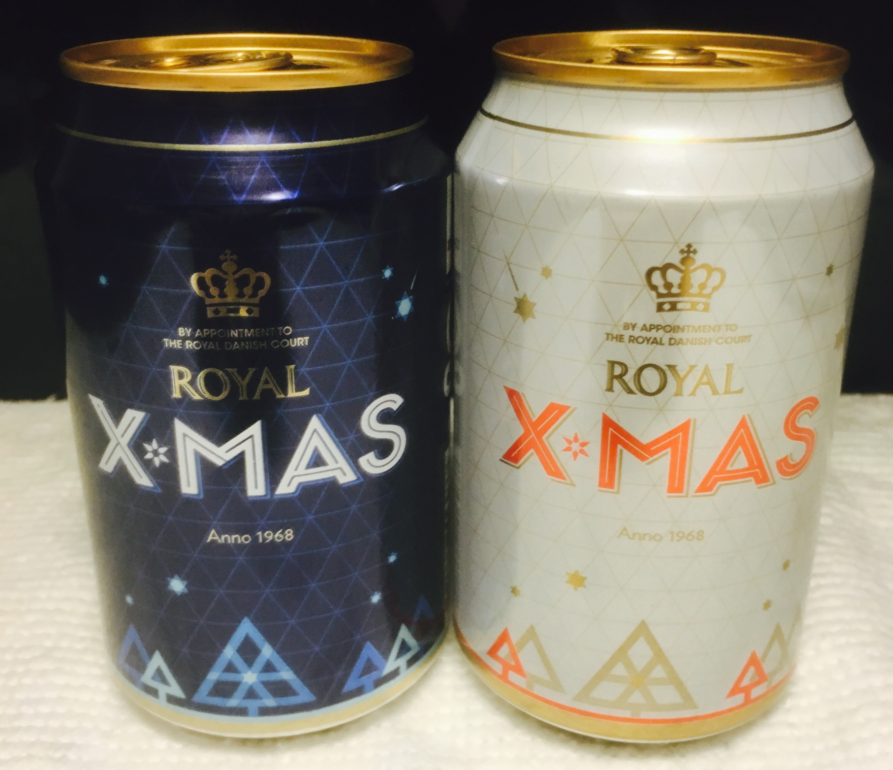 Hvid og blå X-mas øl.